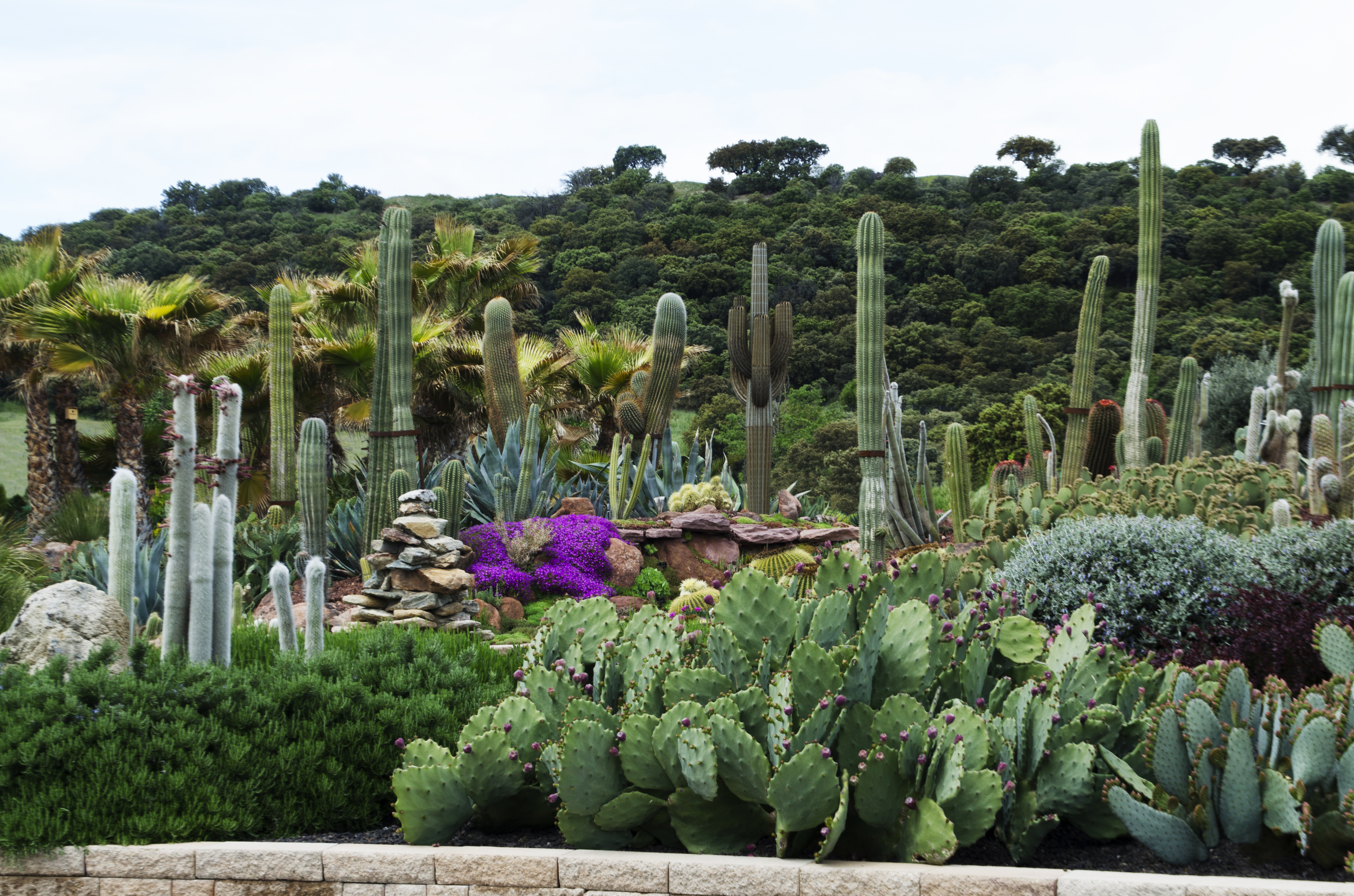 DesertCity